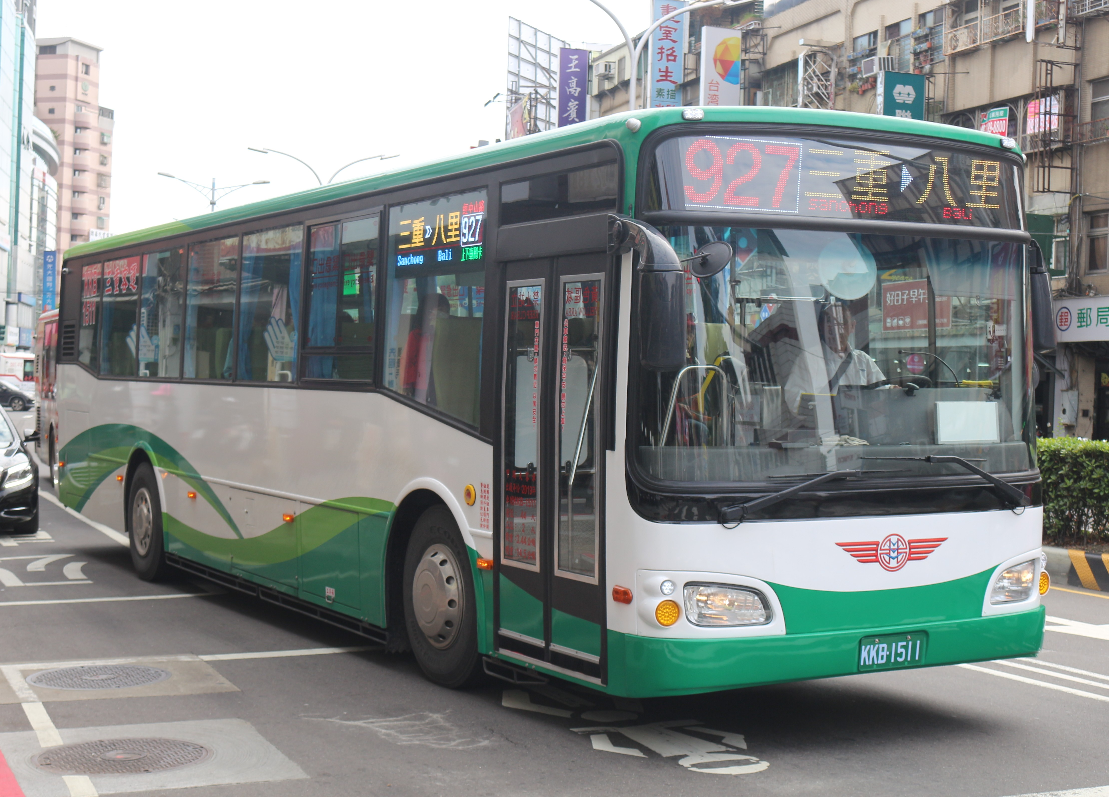 三重客運KKB-1511 927門側